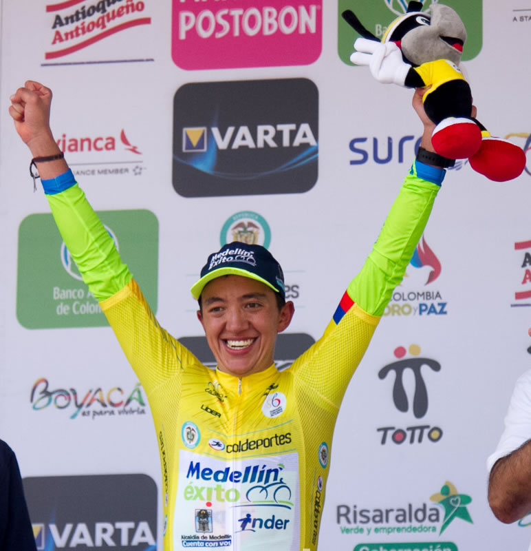 Nicolás Paredes Líder de la Vuelta a Colombia 2017 Etapa 2